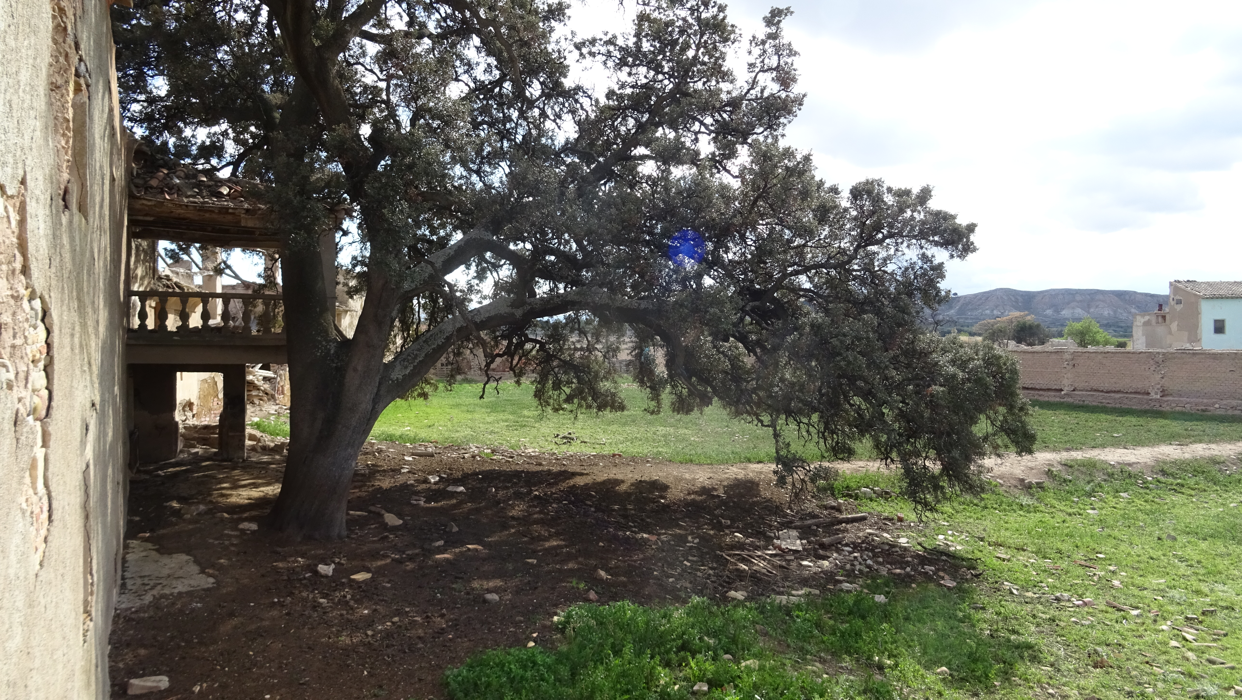 Aragonés: carrasca de Ganyarul